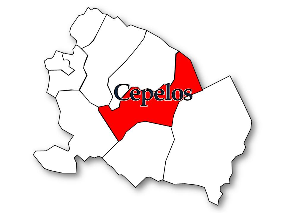 Evolução demográfica do concelho de Vale de Cambra